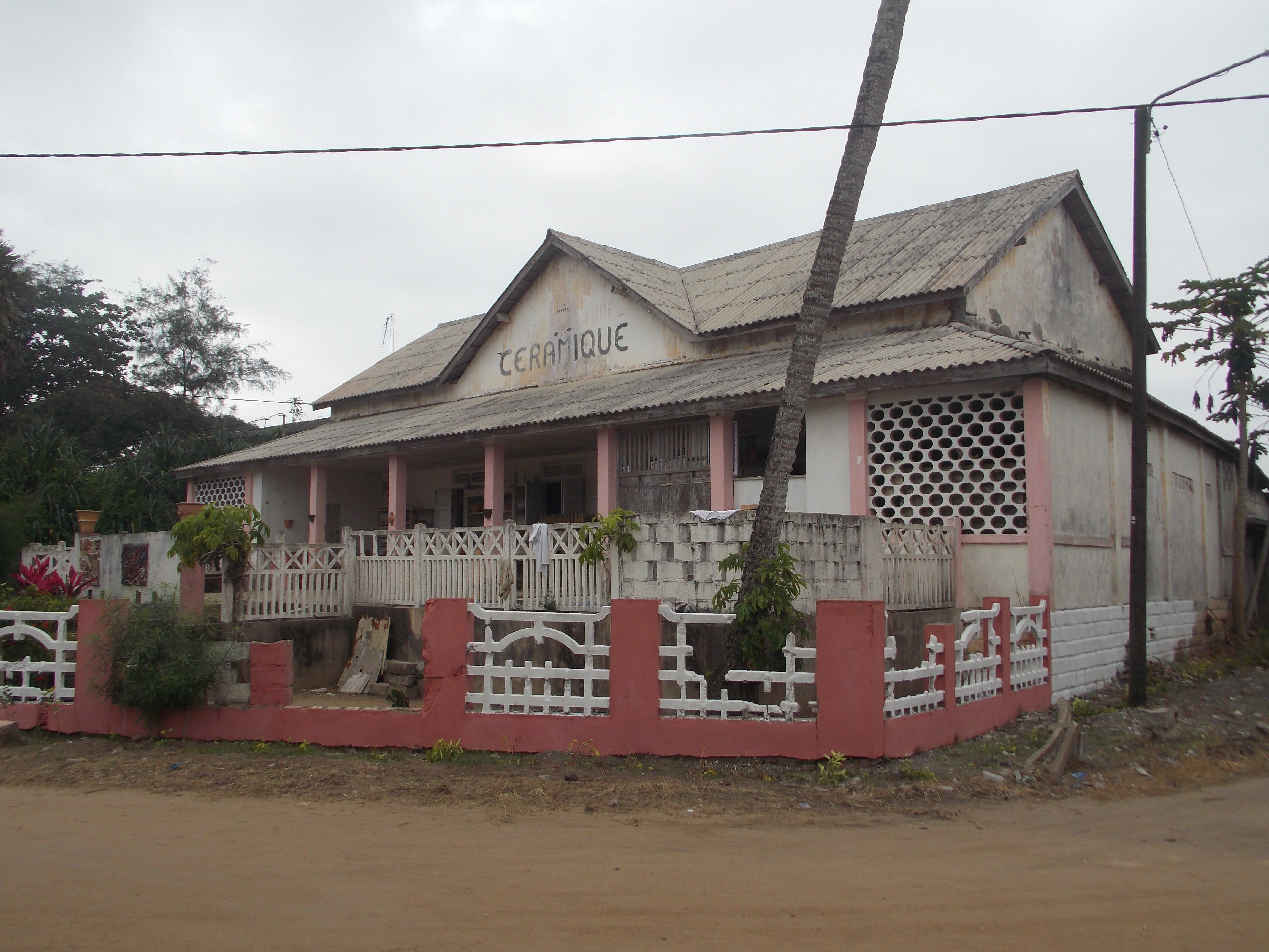 Centre céramique de Grand-Bassam